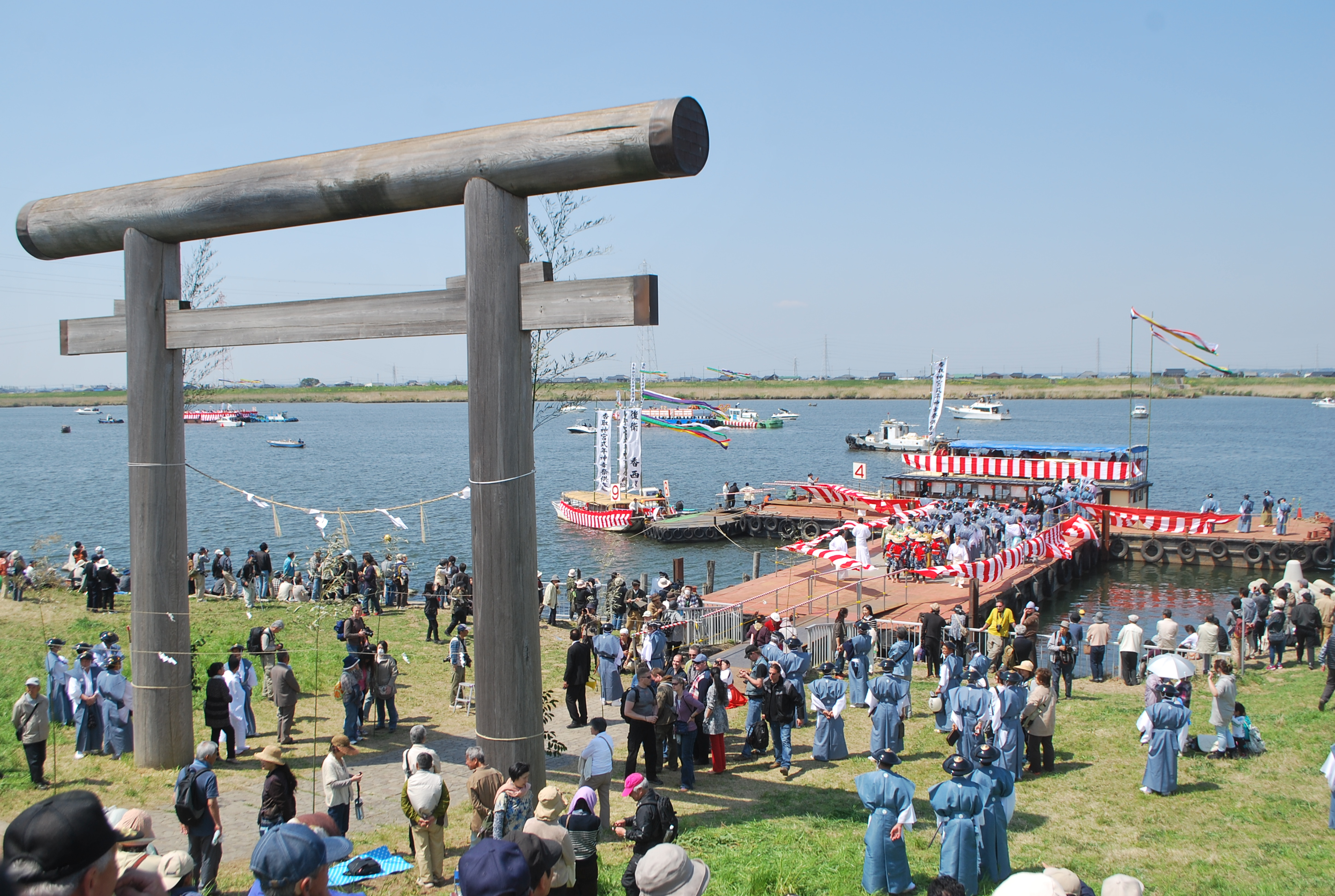 香取神宮、12年に一度の式年神幸祭。津宮鳥居河岸から御座船に乗船し佐原まで出発する。 香取市。